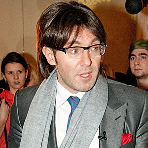 Андрей Малахов на вечере в гостинице «Рэдиссон Ройал» 15 декабря 2010 год